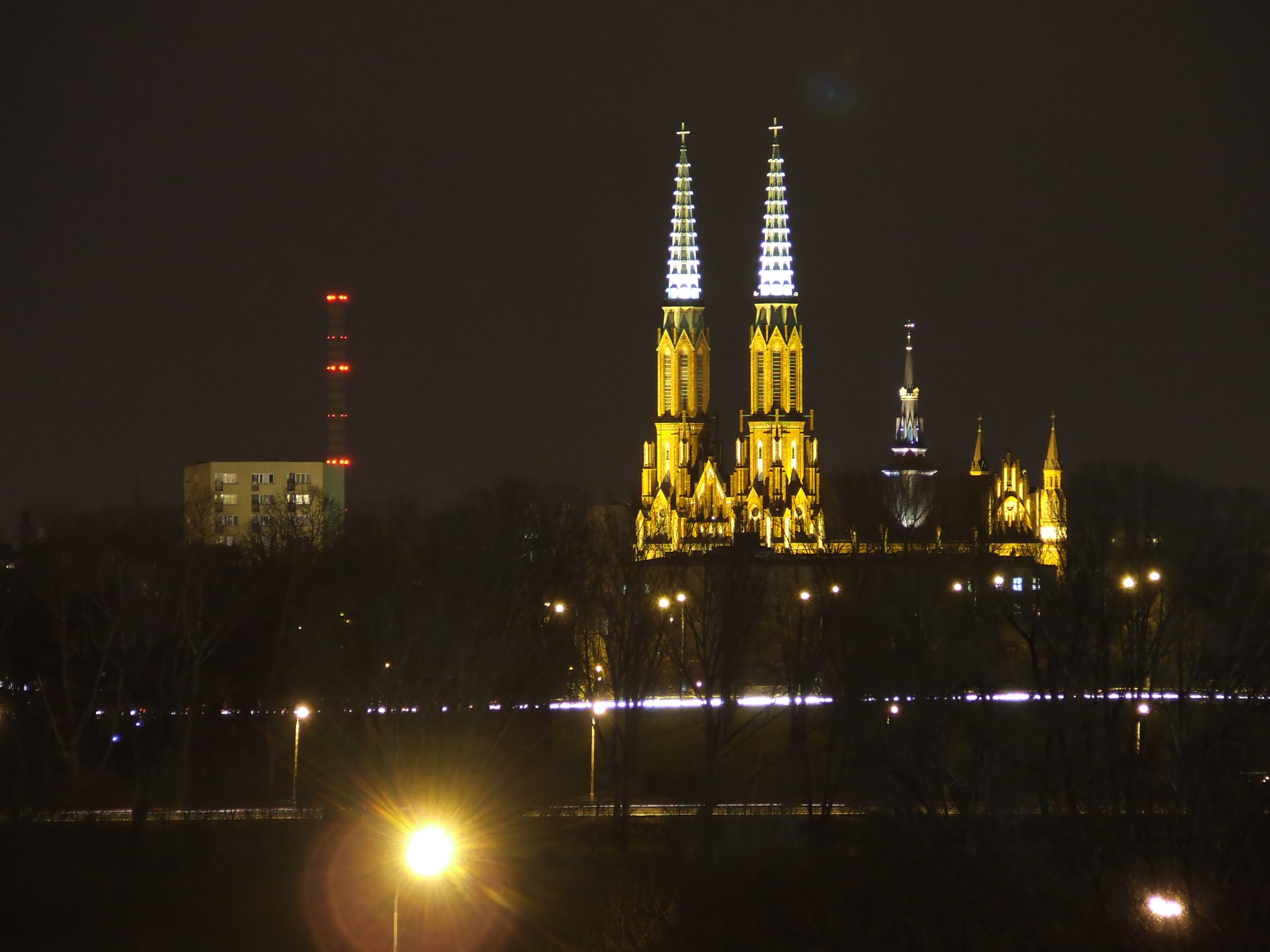 Kościół świętego Michała i świętego Floriana w Warszawie na Pradze